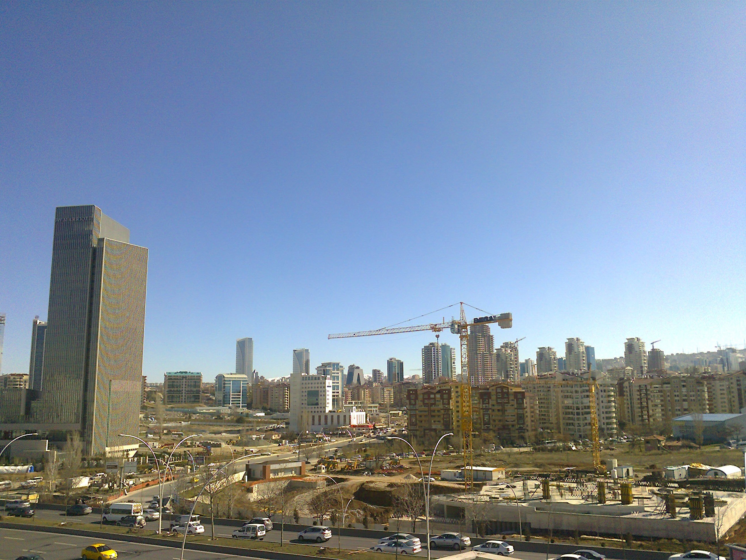 Ankara'nın Eskişehir yönünde bulunan ve Eskişehir Yolu diye tabir edilen yoldan bir görüntü